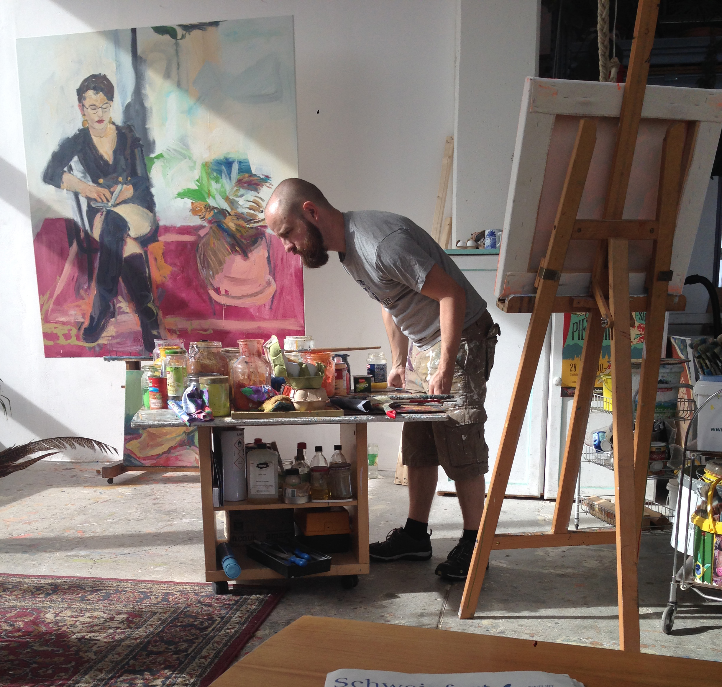 Künstlerisches Werk=Robert Weissenbacher, Titel "Maria" 2017 gemalt (Eitempera auf Leinwand; 160×145 cm) Foto=Matthias Neuer (